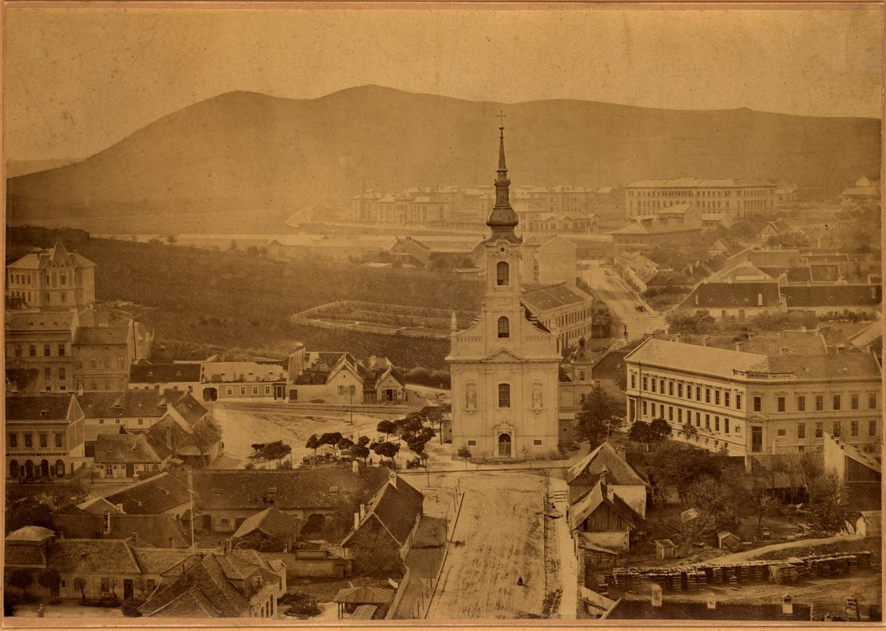 Krisztinavárosi templom és környéke az Alagút utca felől. A háttérben valószínűleg a helyőrségi kórház épületei, az előtérben jobbra pedig az Elemi Népiskola látható a Krisztina körút környékén